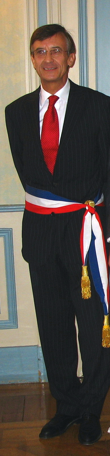 Célébration d'un mariage par Bernard Bosson, maire d'Annecy de 1983 à 2007.